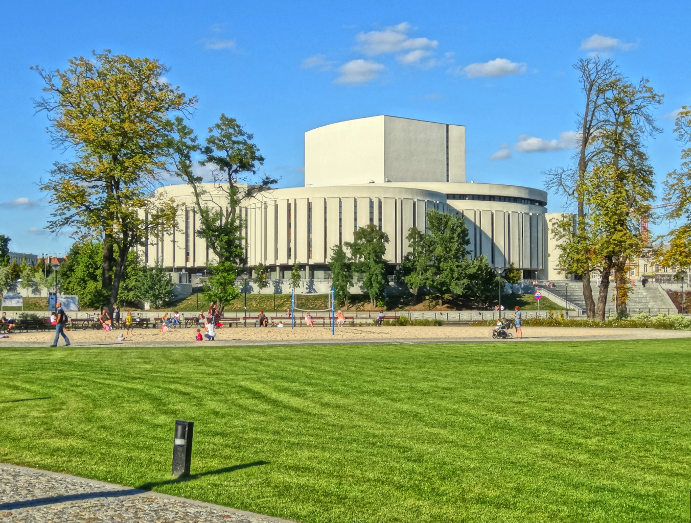 Budynek Opery Nova, zbud. w latach 1973-2006 w Bydgoszczy, ul. Ferdynanda Focha 5